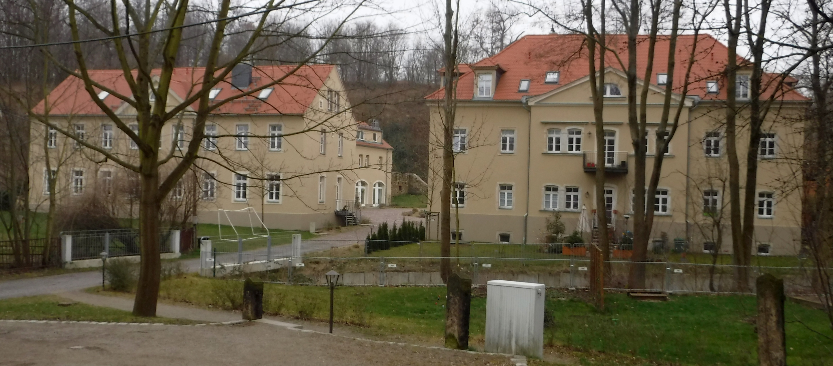 Bramsch-Gut, Am Kirchberg 23; Blick von N